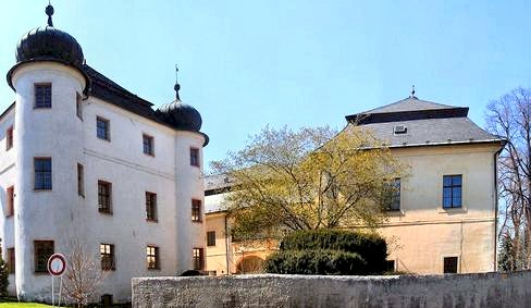 Altes und Neues Schloss, Foto von Fam. Mayerh. 2009